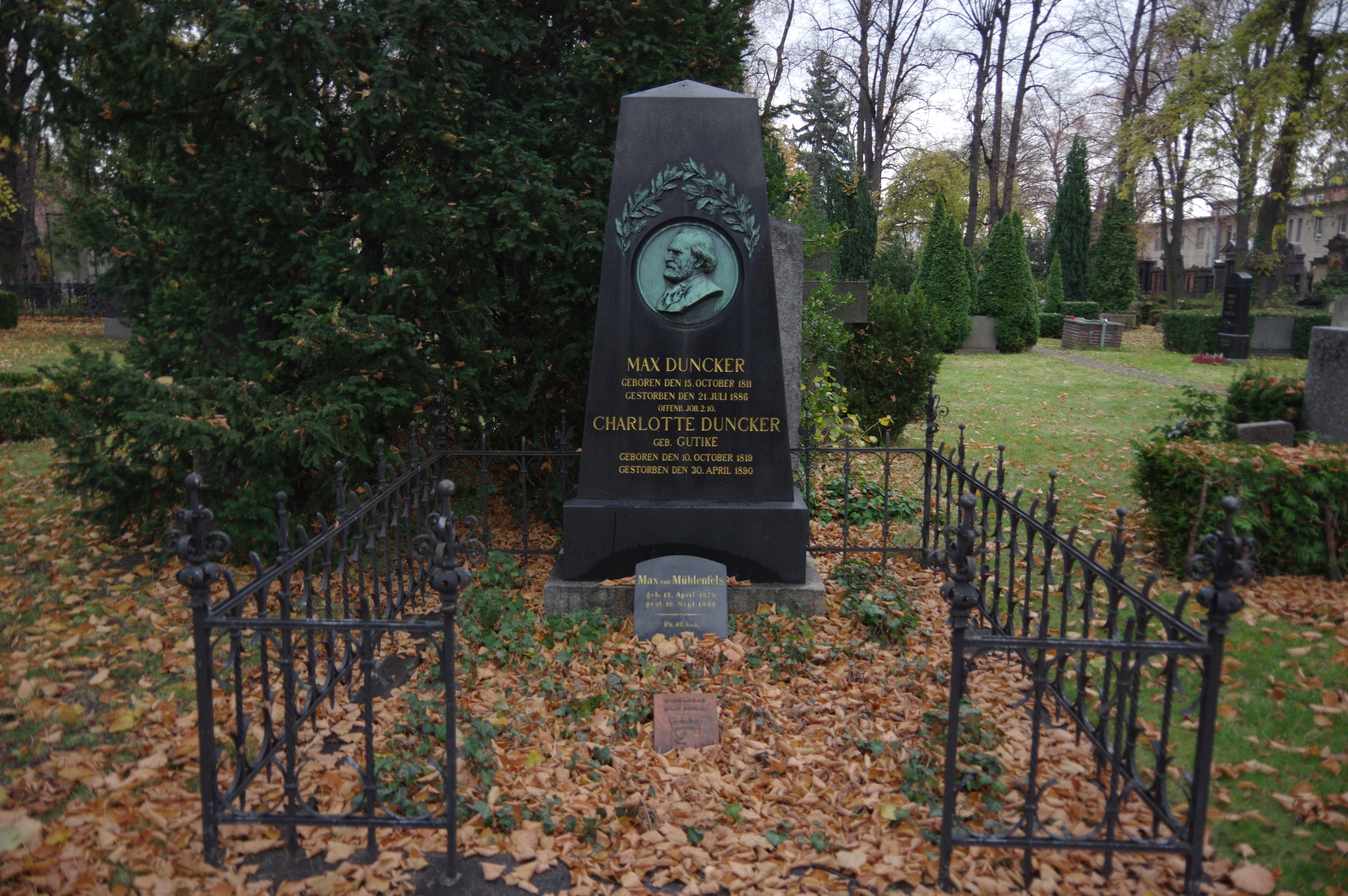 Der Alter Zwölf-Apostel-Kirchhof in Berlin-Schöneberg. Der Friedhof ist denkmalgeschützt.